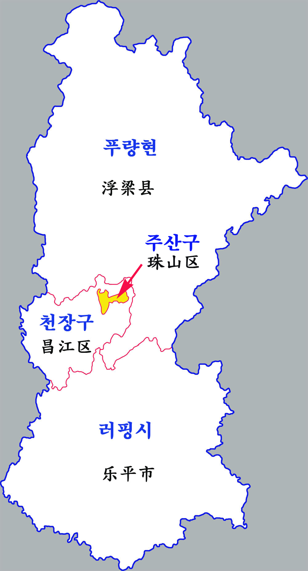 징더전시 현급구역